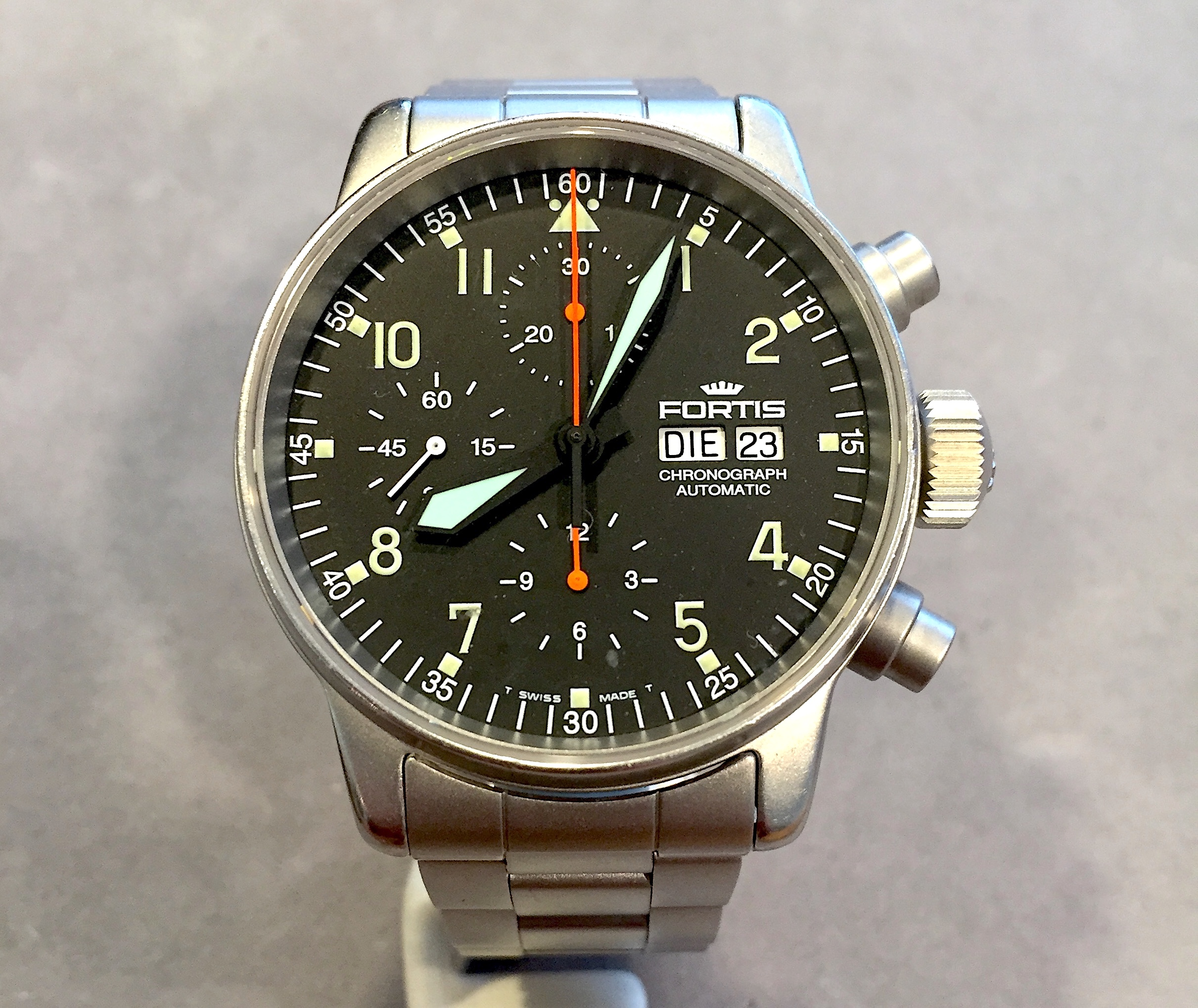 Fortis Flieger Chronograph